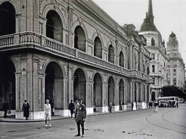 El modificado edificio del Cabildo de Buenos Aires, como se veía hacia 1930: sin su torre, con su fachada modificada al estilo italiano y con su lado norte demolido por la construcción de la Avenida de Mayo en 1889. En 1931, sería demolido el extremo sur que todavía se puede ver en margen izquierdo de esta foto. Recién en 1940, el Cabildo sería restaurado recuperando su estilo colonial original. Al fondo, a la derecha, se observa el Palacio Municipal con su cúpula original de 65 metros, y el edificio del Banco Argentino Uruguayo terminado hacia 1928.